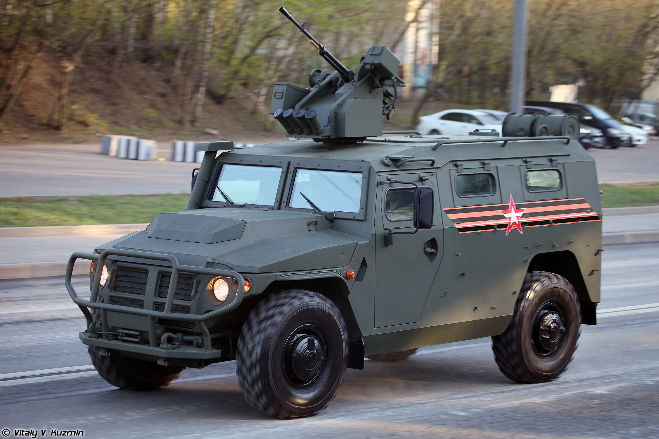 АМН 233114 Тигр-М с боевым модулем Арбалет-ДМ (AMN 233114 Tigr-M with remote weapon station Arbalet-DM)